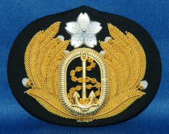 幹部用正帽章